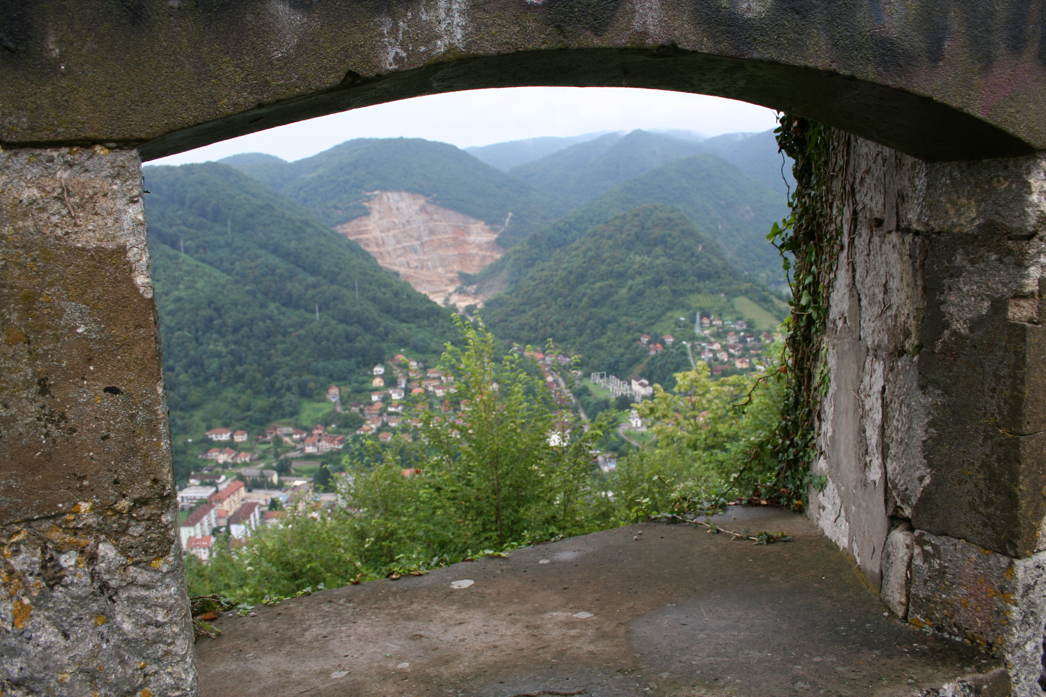 Pogled na Mali Zvornik sa Kule grada u Zvorniku, Republika Srpska